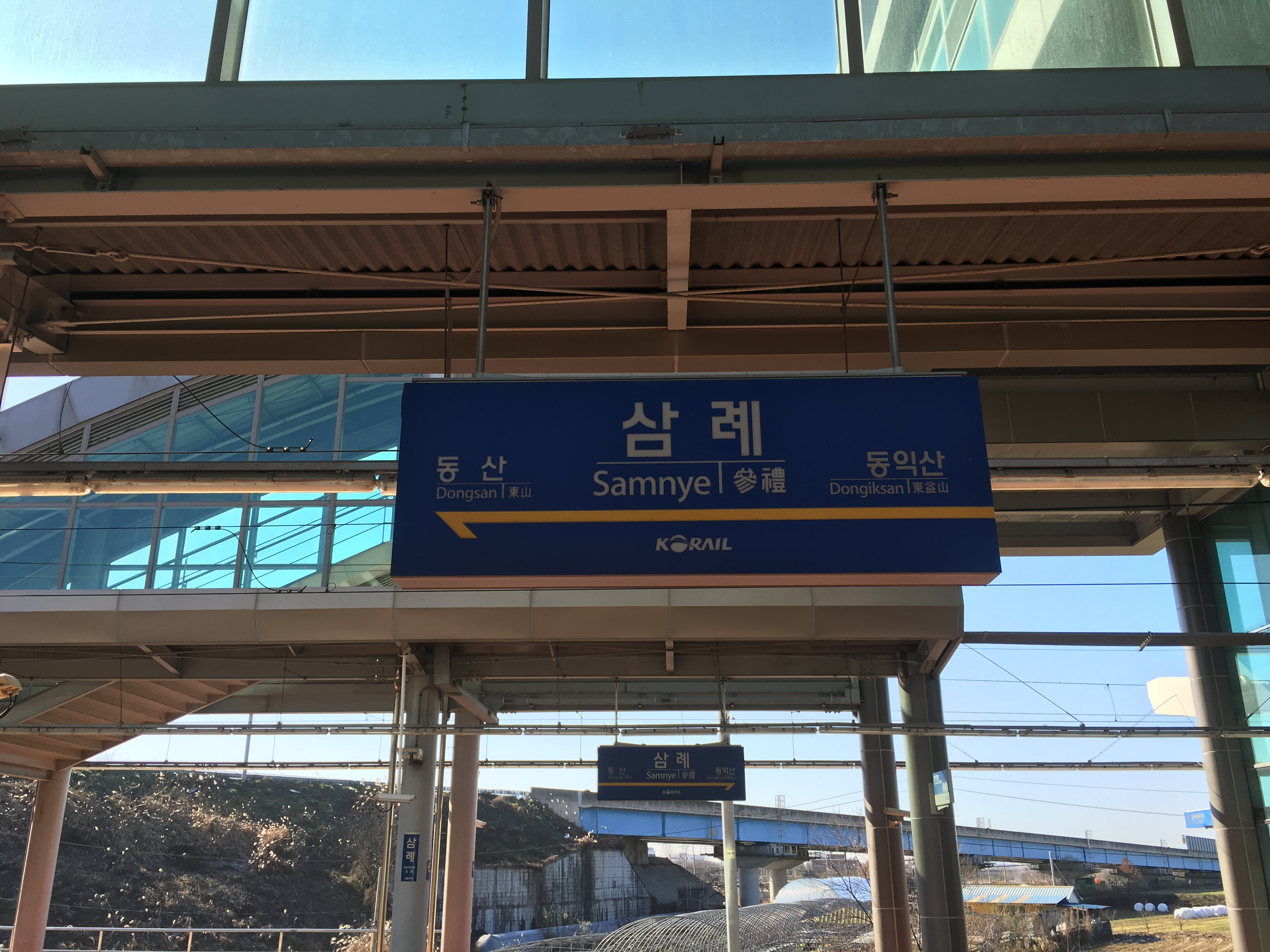 삼례역 역명판